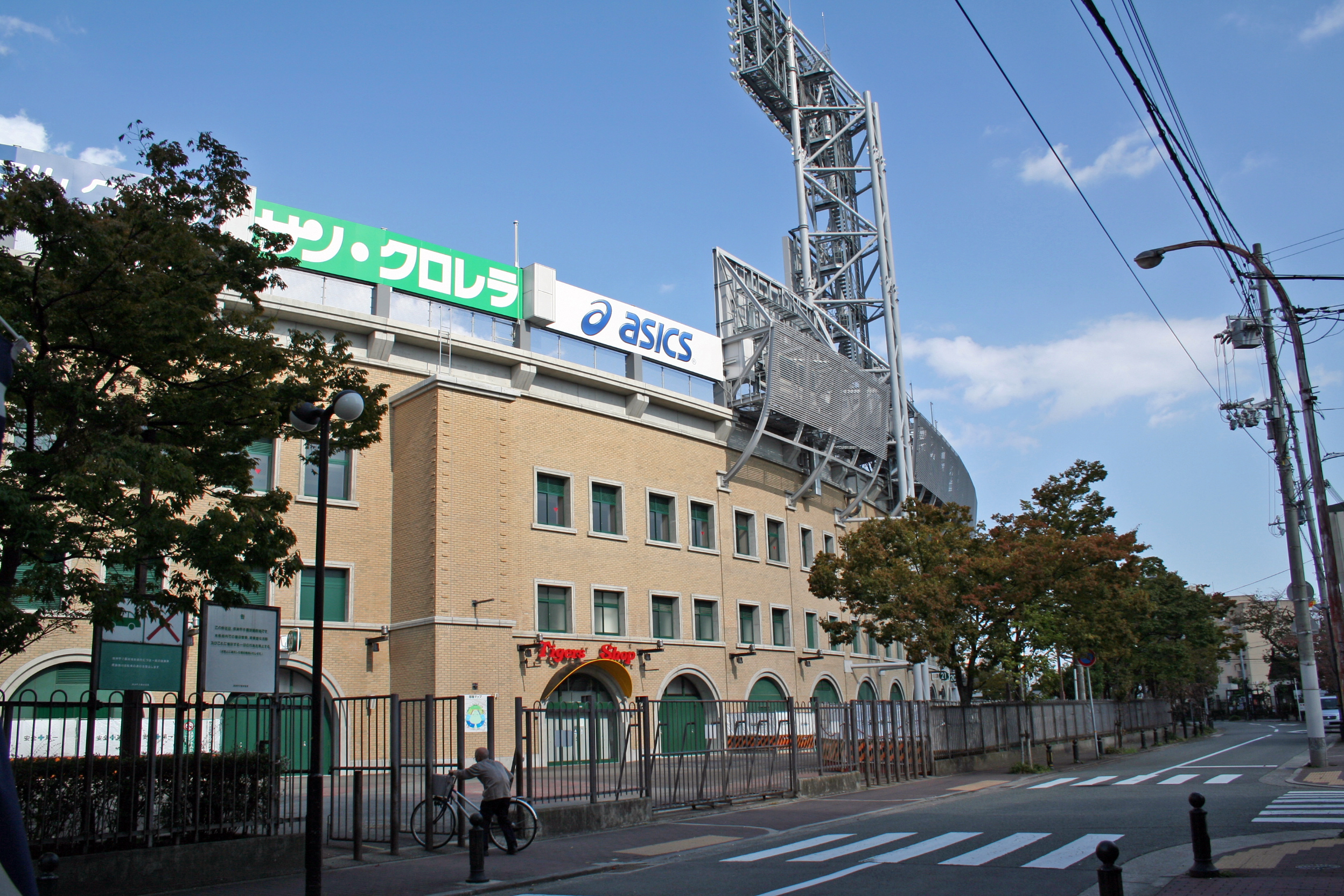 阪神甲子園球場の外周の風景。球場の北東部から時計回りに撮影。